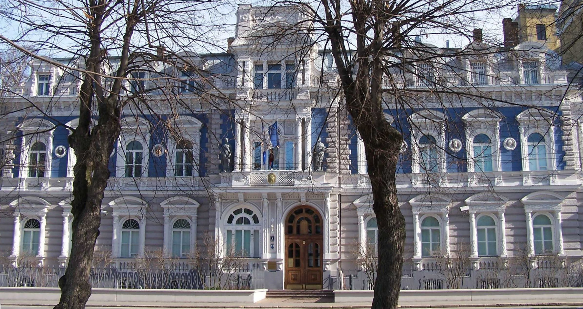 Ambassade de France à Rīga.